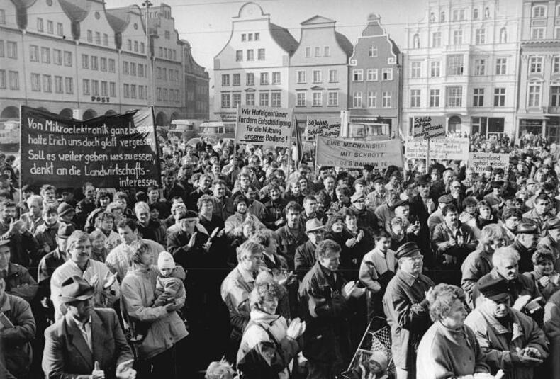 ADN-ZB Sindermann 24.2.90 Rostock: Soziale Sicherheit und Gerechtigkeit forderten Bauern des Küstenbezirkes Rostock auf der ersten Bauerndemonstration vor dem Rathaus der Stadt. Sie forderten u.a. eine Schonfrist, um die von unsinnigen Reglungen, Uralttechnik und Raubbau gezeichnete, uneffektive Bewirtschaftung des Grund und Bodens durch die Einführung neuer Strukturen wettbewerbsfähig zu machen.